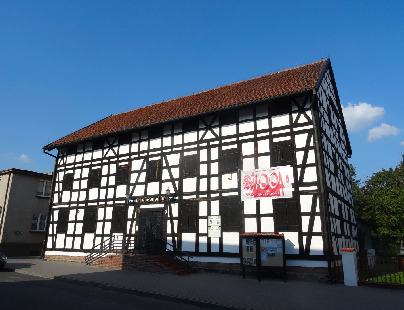 Muzeum Ziemi Krajeńskiej w dawnym spichrzu przy ul. Pocztowej 14 w Nakle nad Notecią